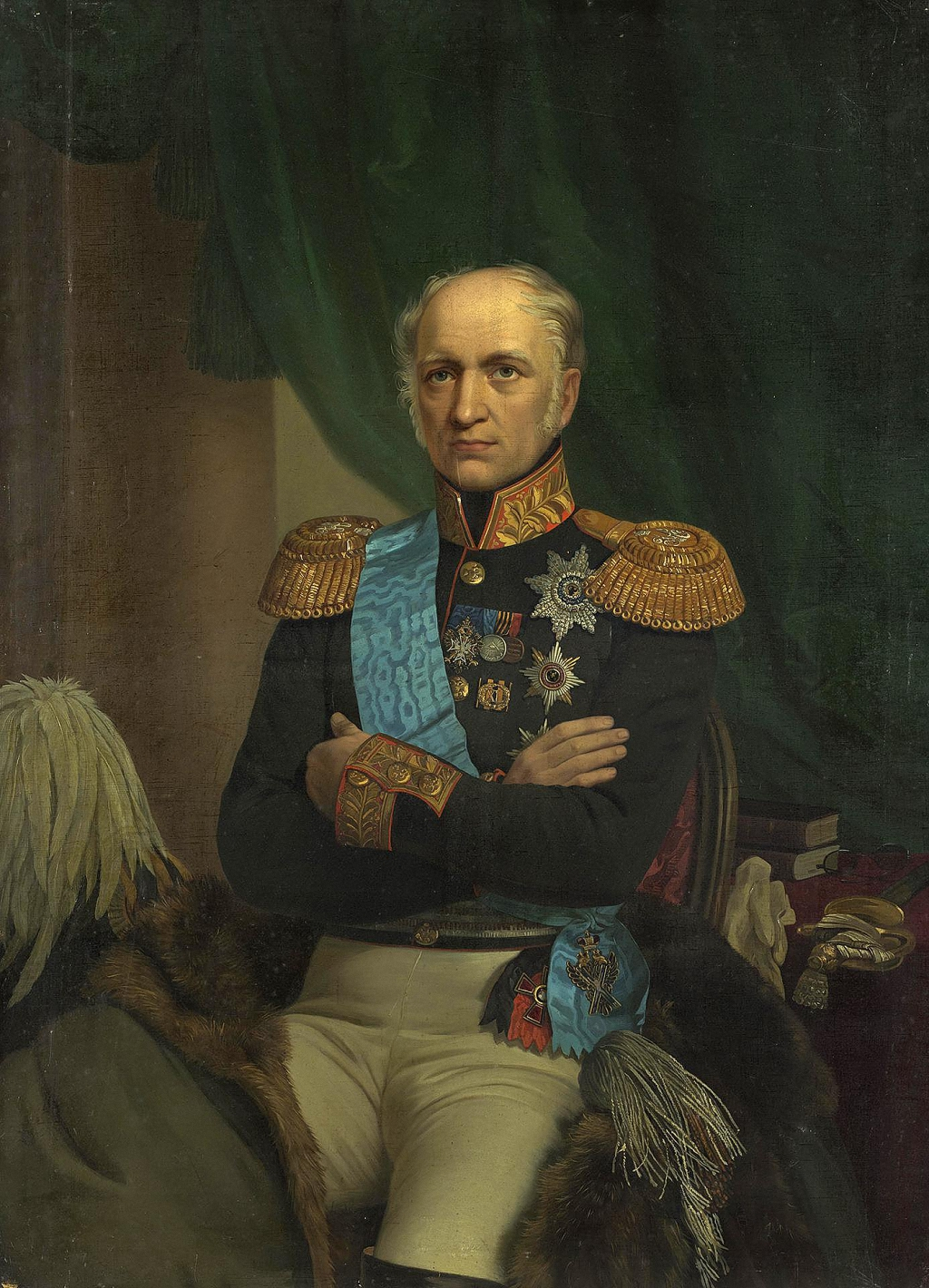 Картина «Портрет Е. Ф. Канкрина» — художник Егор (Георг) Иванович Ботман, русский придворный живописец, портретист, академик Императорской Академии художеств.